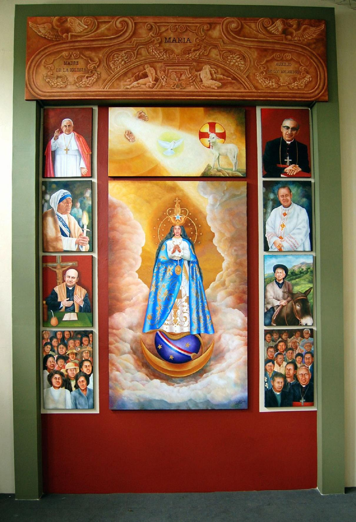 Polittico "Vergine di Caacupé" nella parete del salone parrochiale